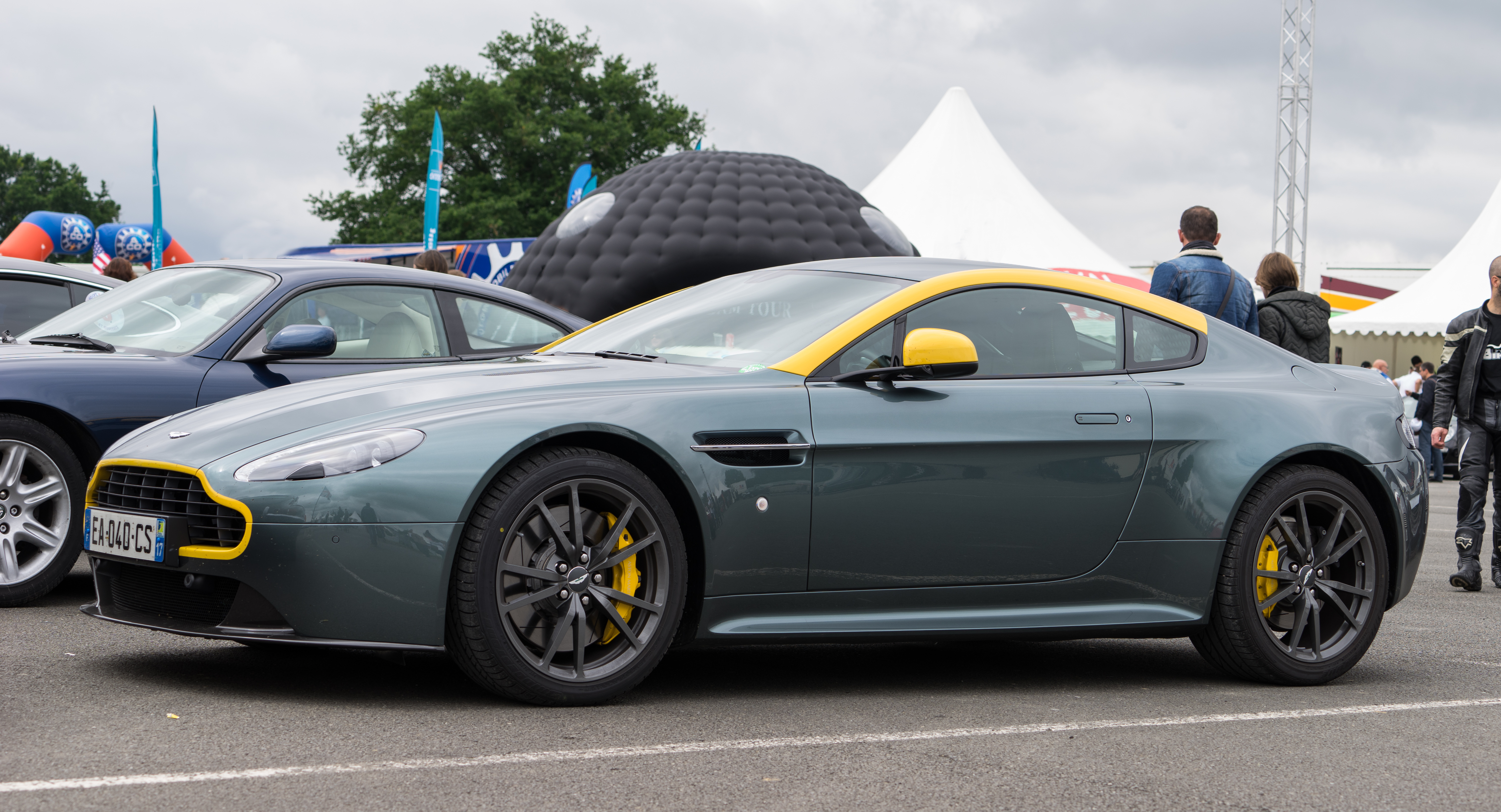 V8 4.7 436cv 490N.m 0-100 en 4.8sec 1610kg Prix sortie 2015 : Méca : 115.383€ Sportshift II : 120.797 euros